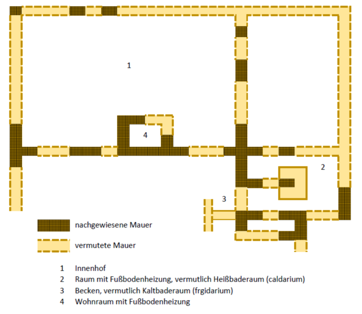 Deutschland (D) - Baden-Württemberg (BW) - Landkreis Konstanz (KN) - Eigeltingen: Villa rustica, Grundriss des Haupthauses